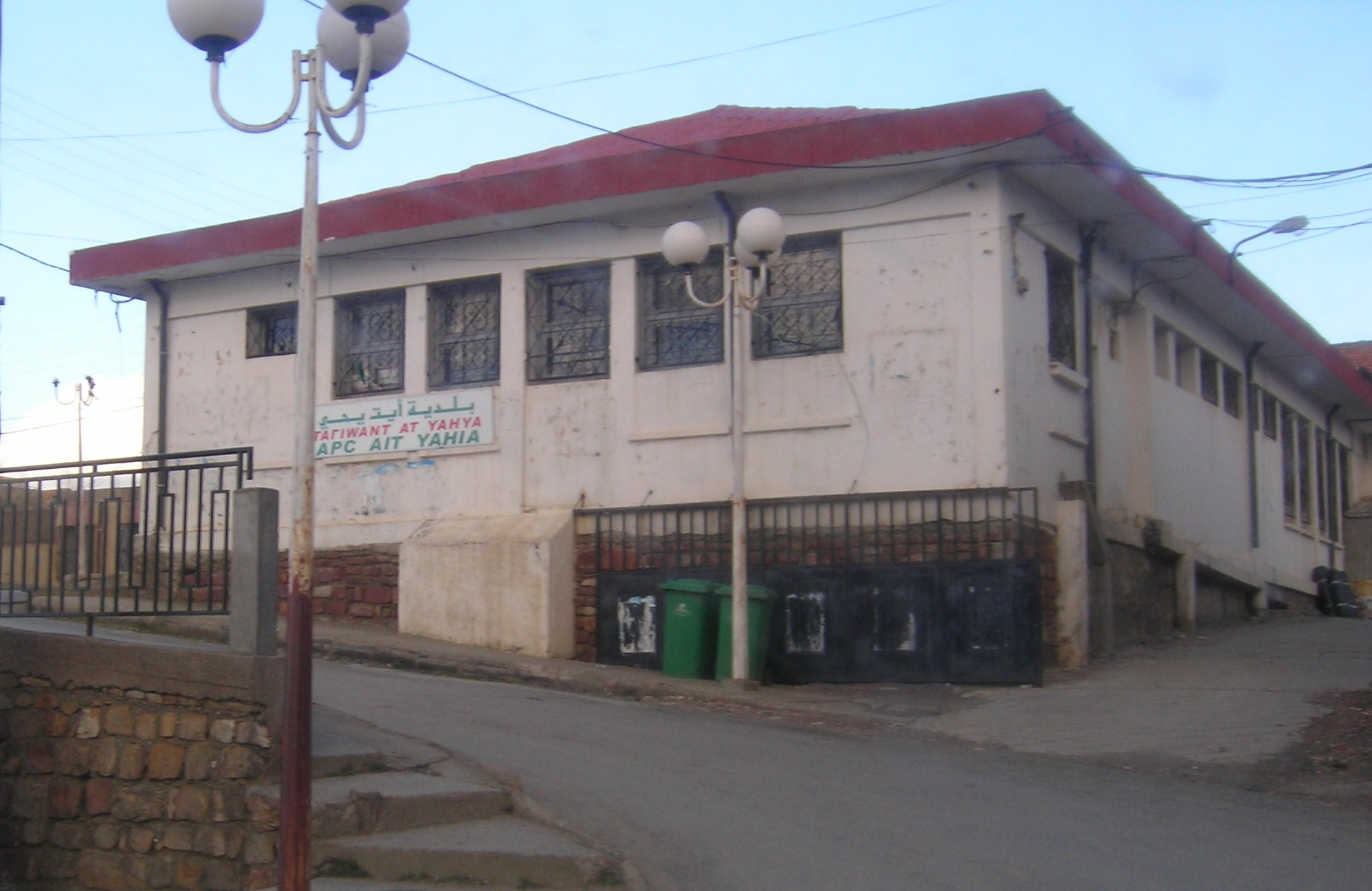 Façade sud de la mairie de Ait-Yahia dans la daira de Ain El Hammam (Tizi Ouzou)